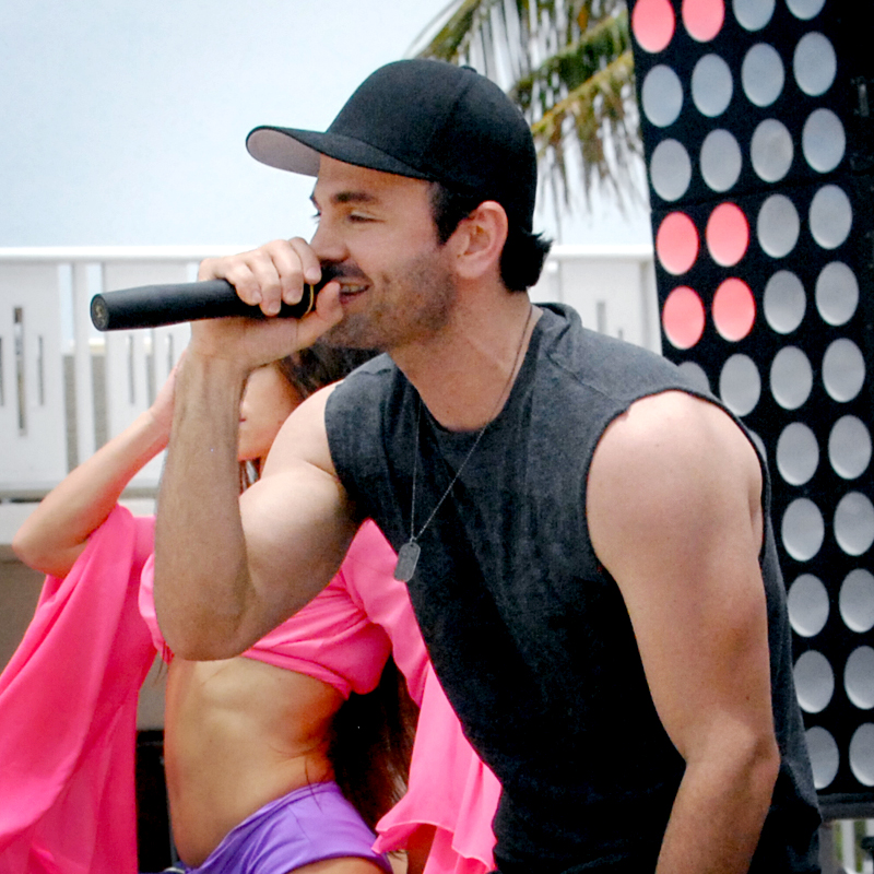 Antonio Asfura en concierto 2015